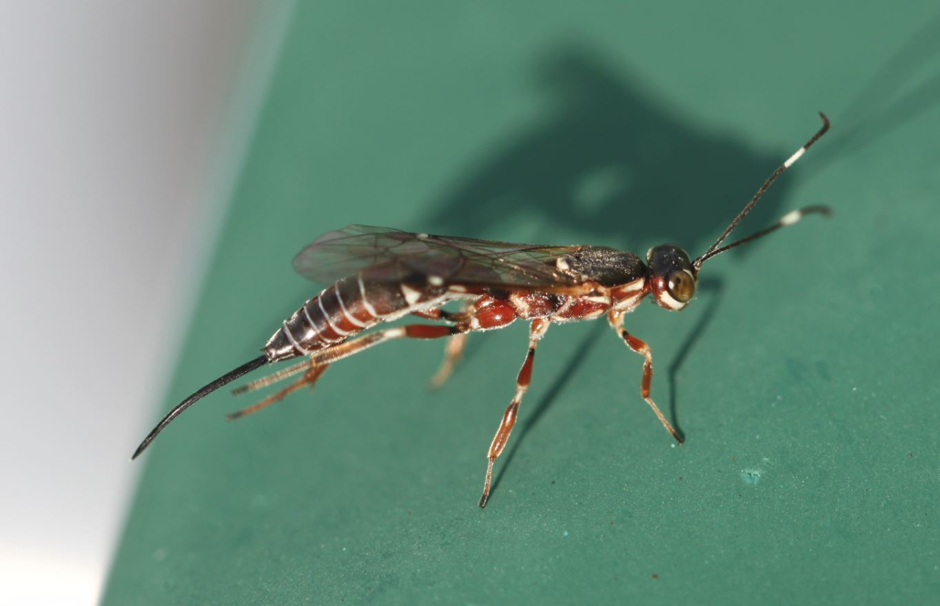 Schlupfwespe Xorides praecatorius, Weibchen, am 20. Juni 2019, vermutlich aus Kaminholz geschlüpft